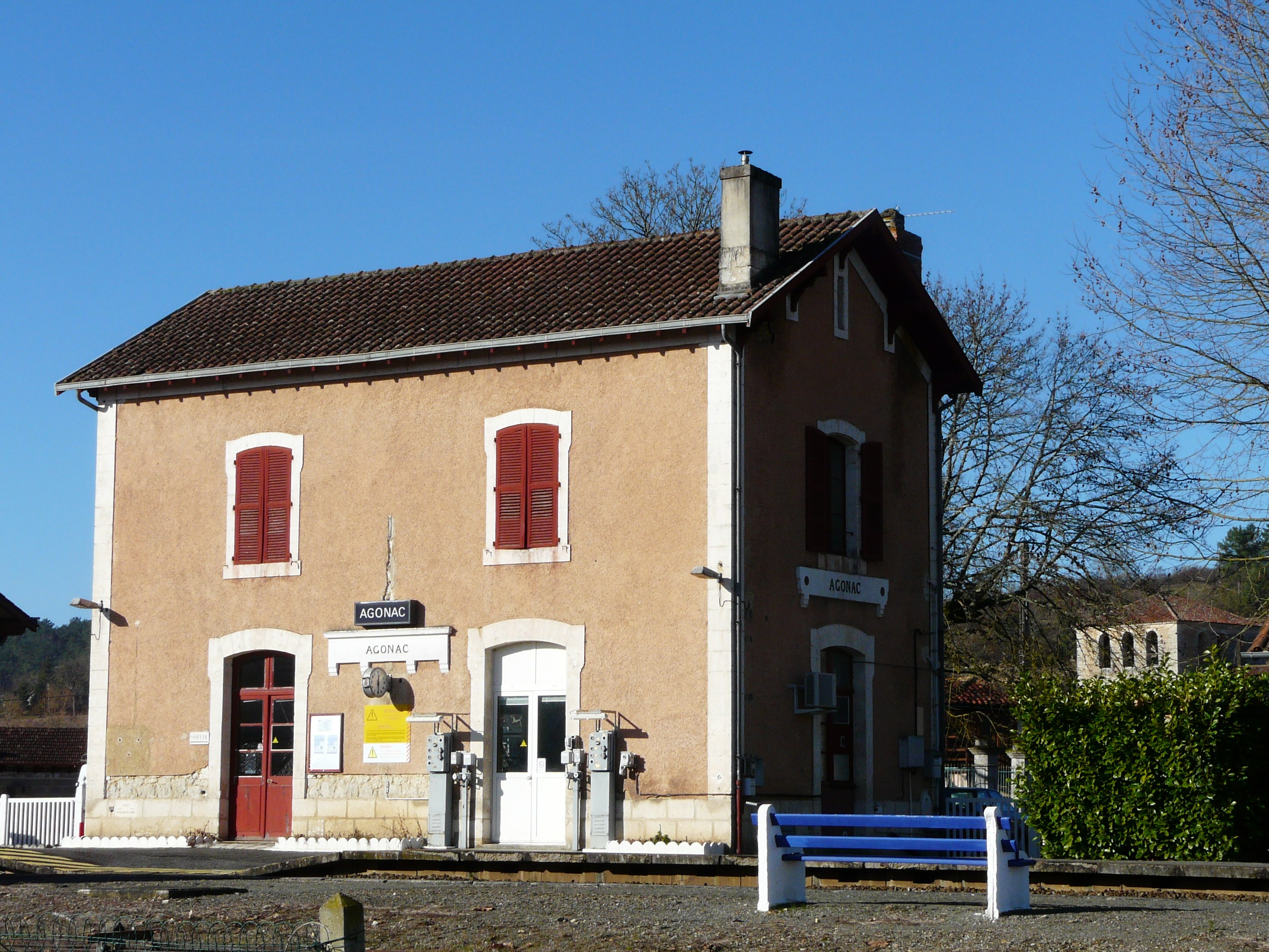 La gare d'Agonac, Dordogne, France.